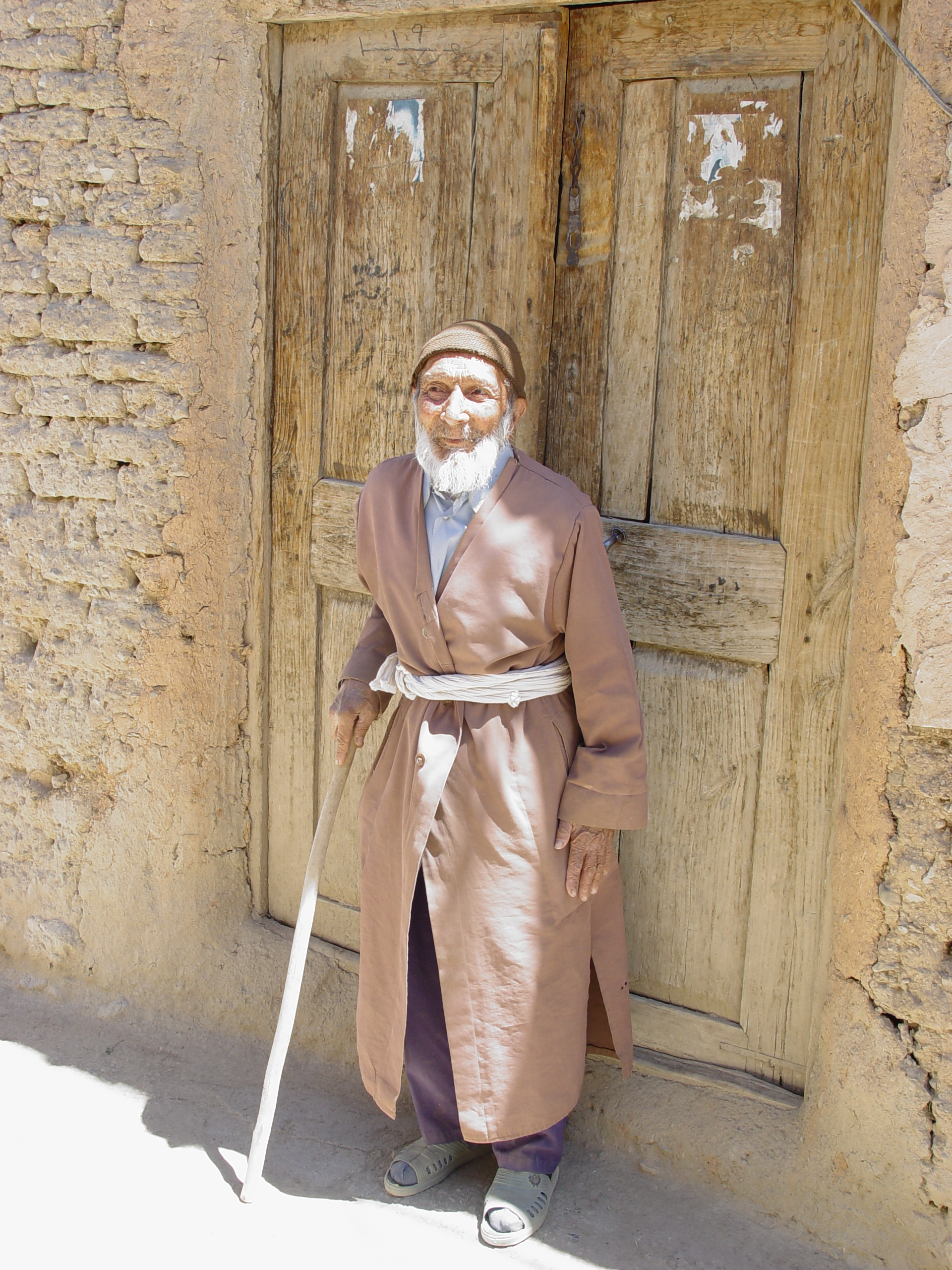 این عکس مربوط به پیرمردی از ساکنان روستای روئین می باشد